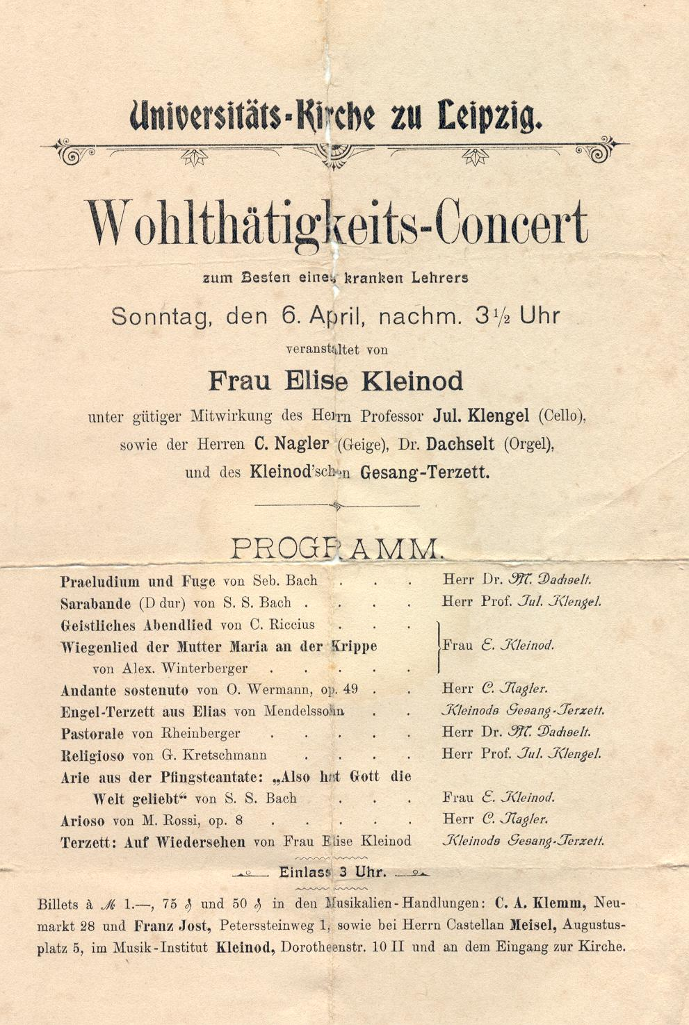 Wohltätigkeitskonzert in der Universitätskirche zu Leipzig, u.a. mit Julius Klengel (Cello) und Karl Friedrich Nagel (Violine).